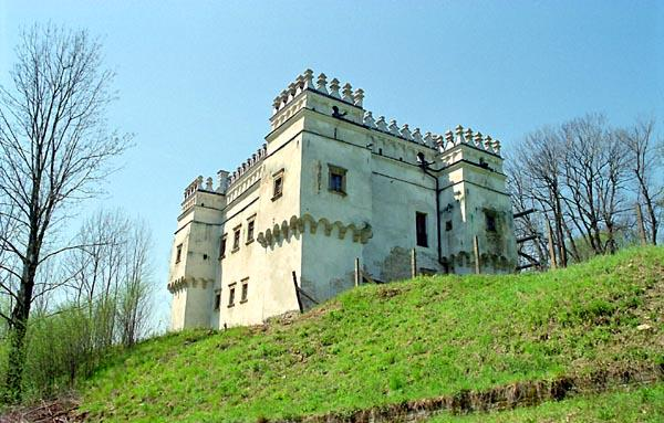 Szymbark in Poland